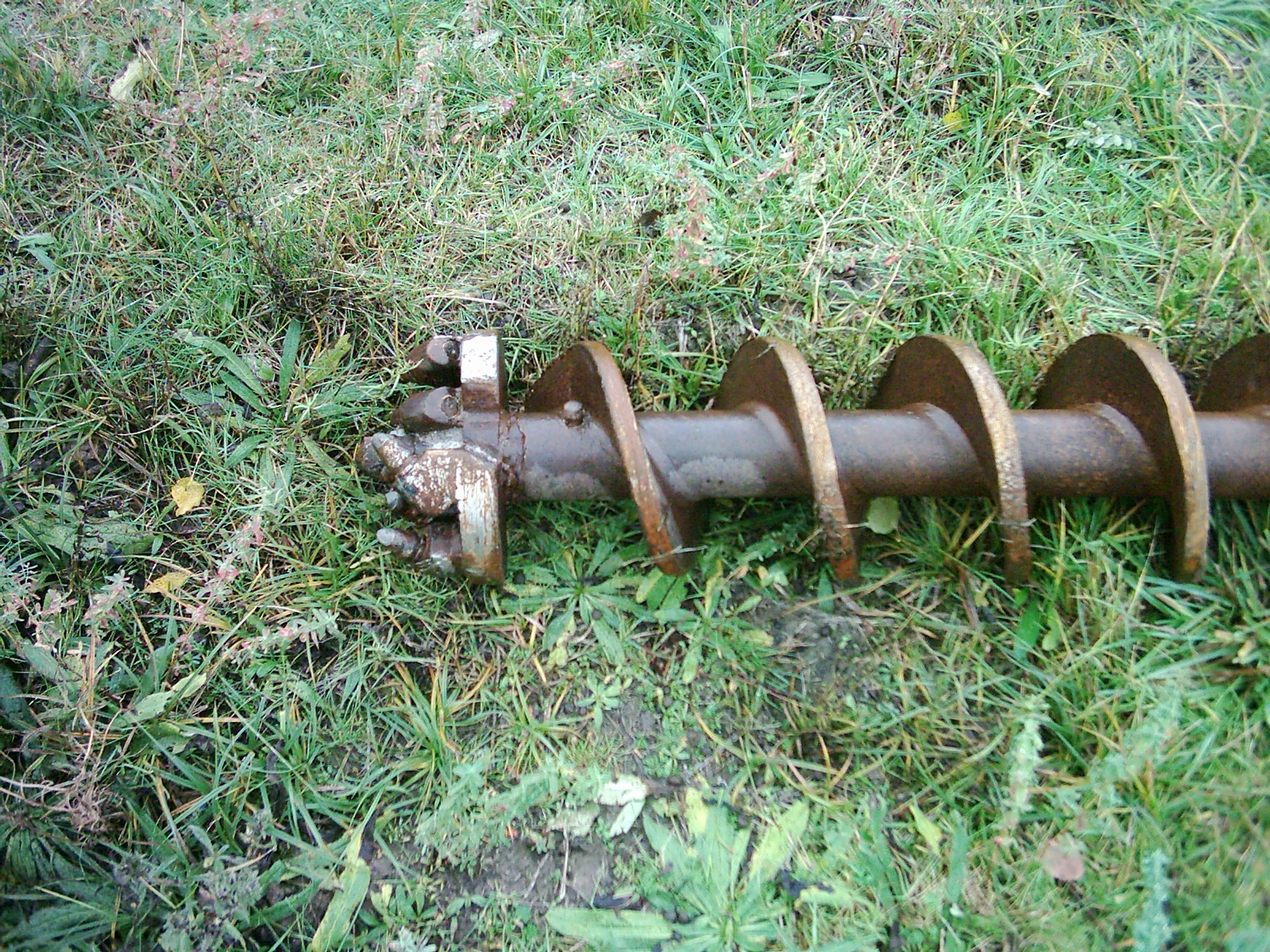 Bohrer eines Drehbohrgeräts (Image:Drehbohrgerät02.jpg), Hamburg-Moorburg.